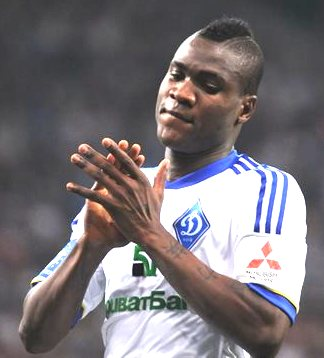 Браун Ідеє - нігерійський футболіст київського Динамо